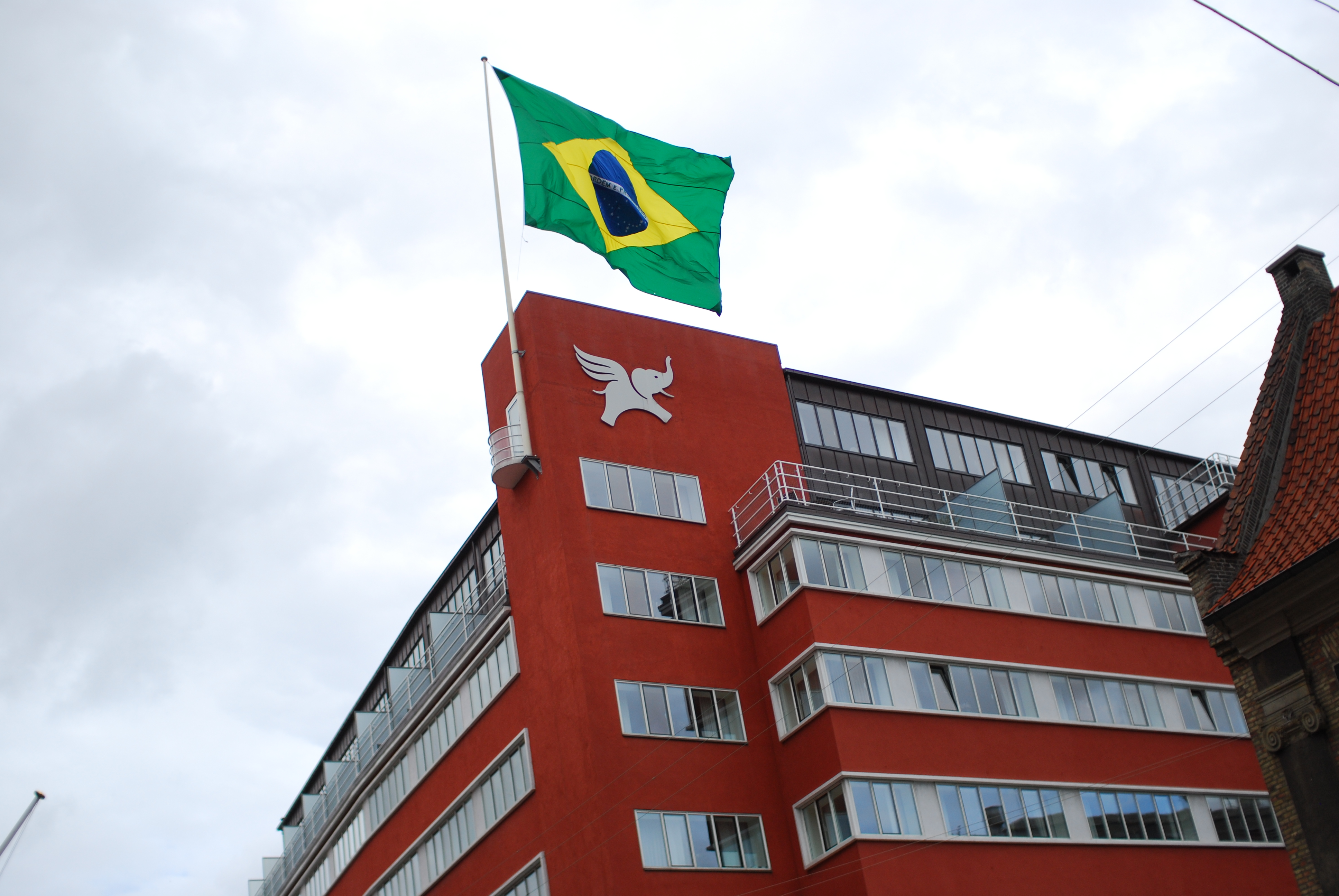 A 2016. évi nyári olimpiai játékok alkalmából felhúzott brazil zászló a koppenhágai Hotel Skt. Petri tetején Dániában.